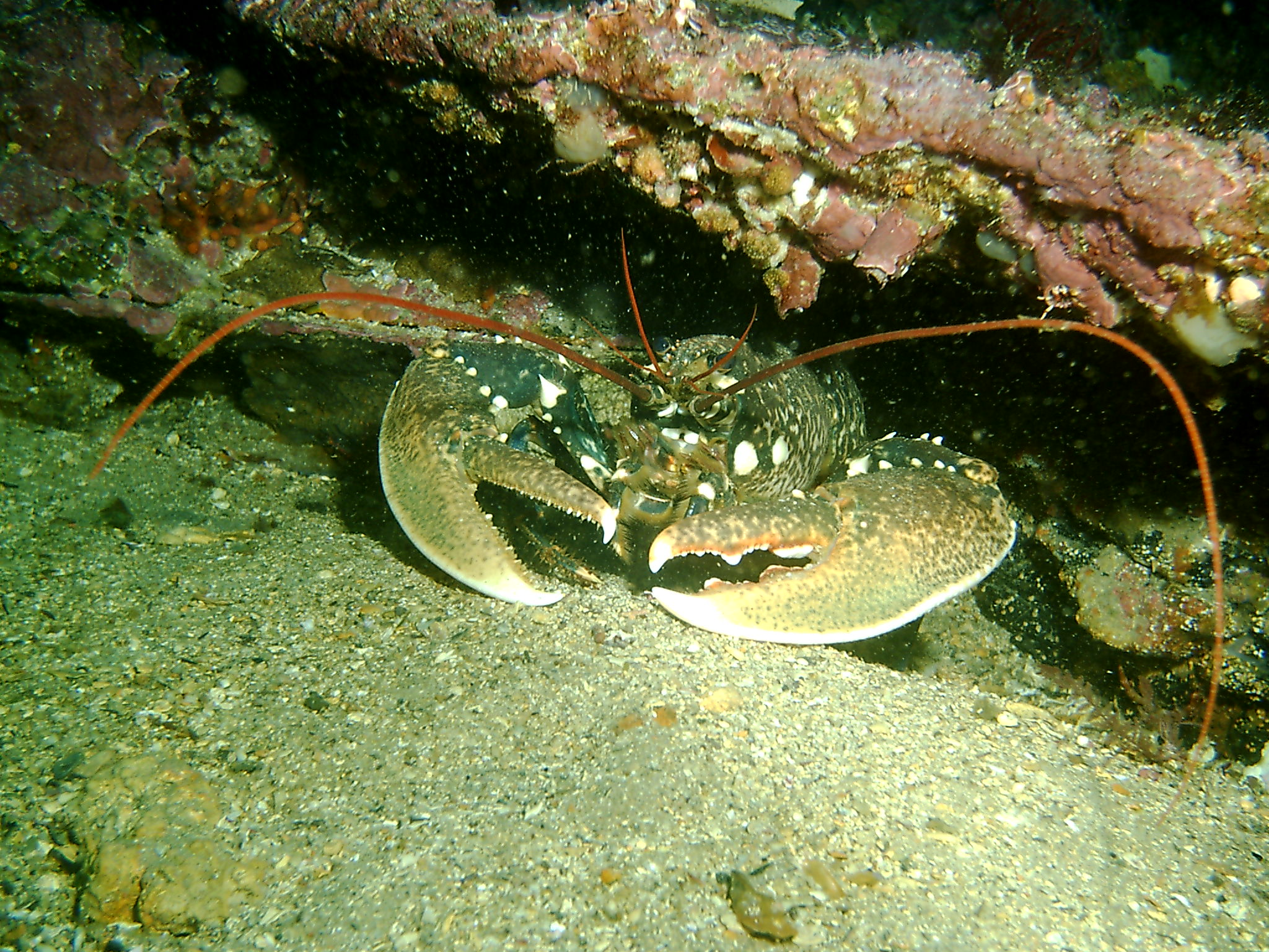 Bogavante escondido en los restos del San Andres hundido sobre los -30m en Tarifa, España, Zona del Estrecho de Gibraltar. Agosto 2005. Temperatura del agua 15° C.